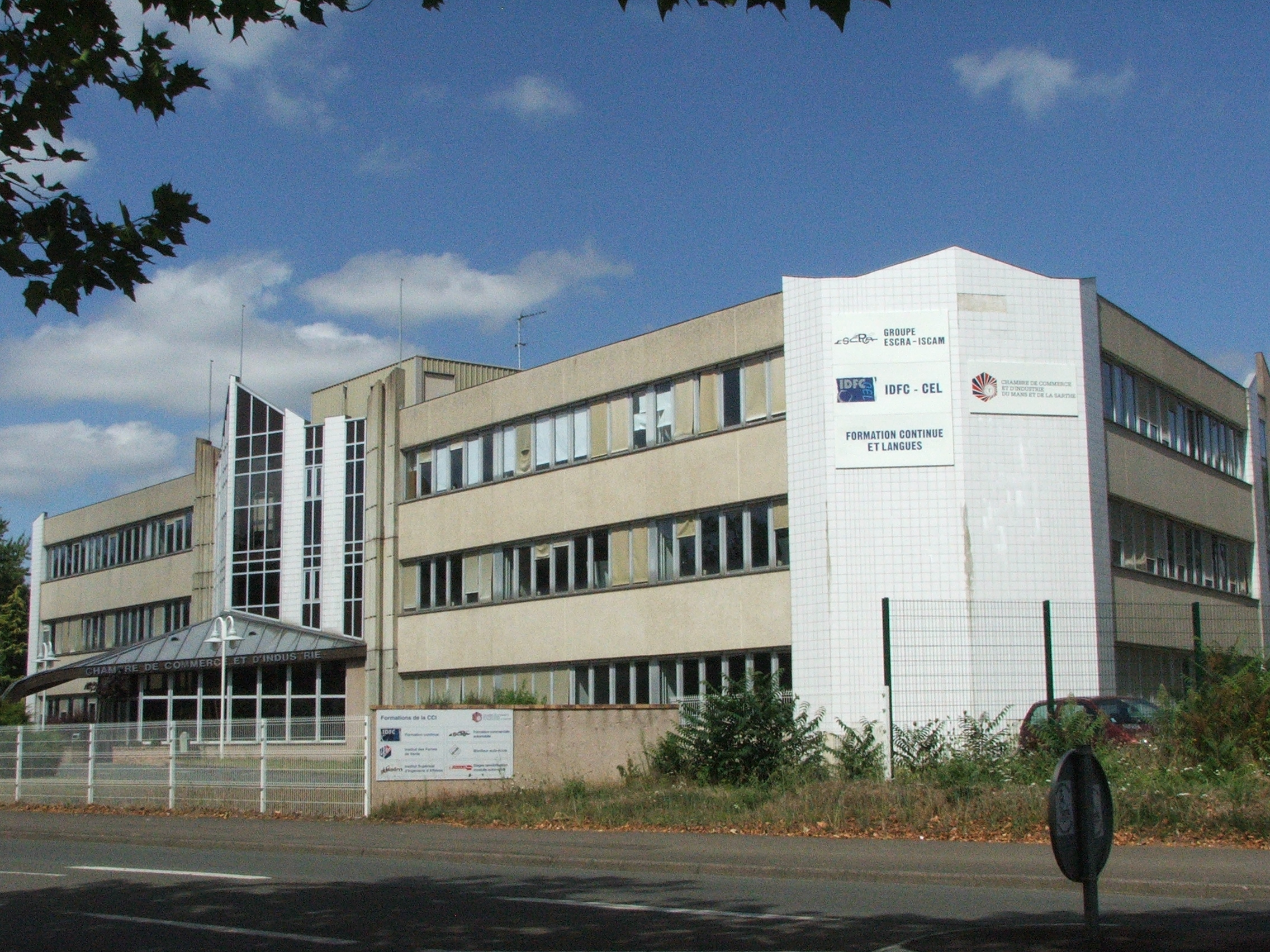 Institut de de Formation continu en langue animé par la CCI de la Sarthe, sur le campus de la Californie au Mans.